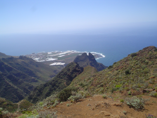 Roque Dos Hermanos, abajo Punta del Hidalgo